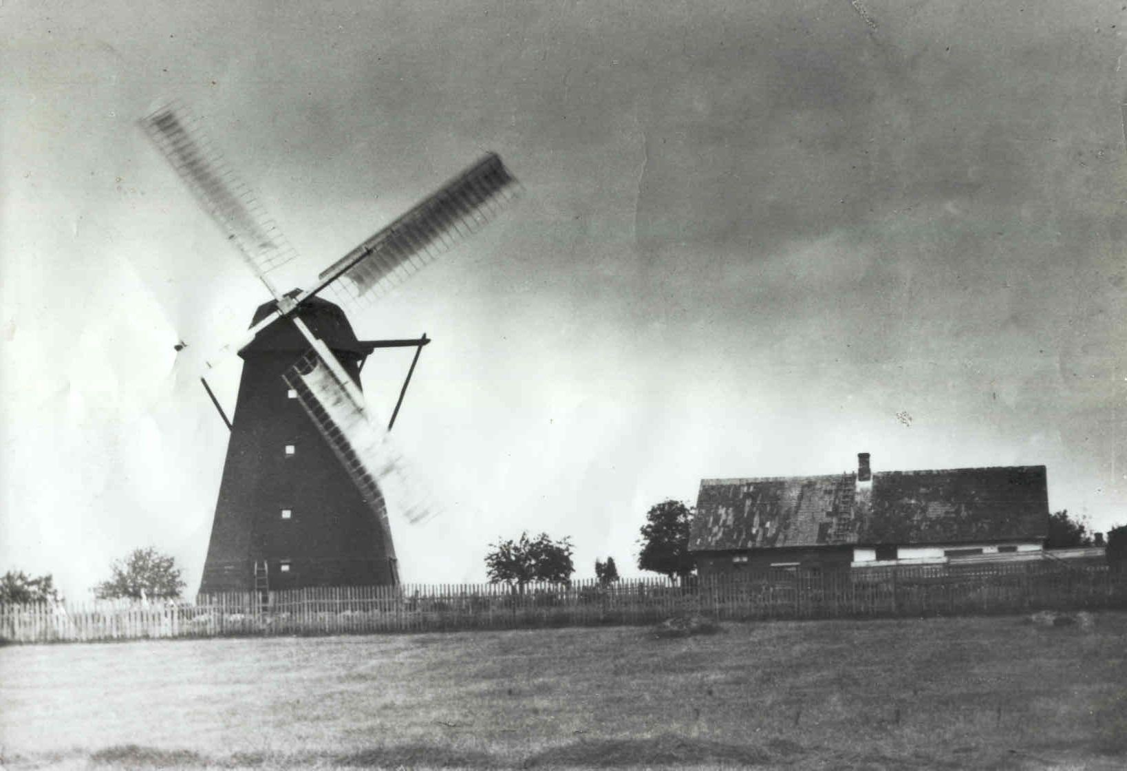 Veskiehitaja Jaan Koni (1852-1912) poeg sai peremeheks ja tellis foto oma 20-aastaseks saanud tuulikust.